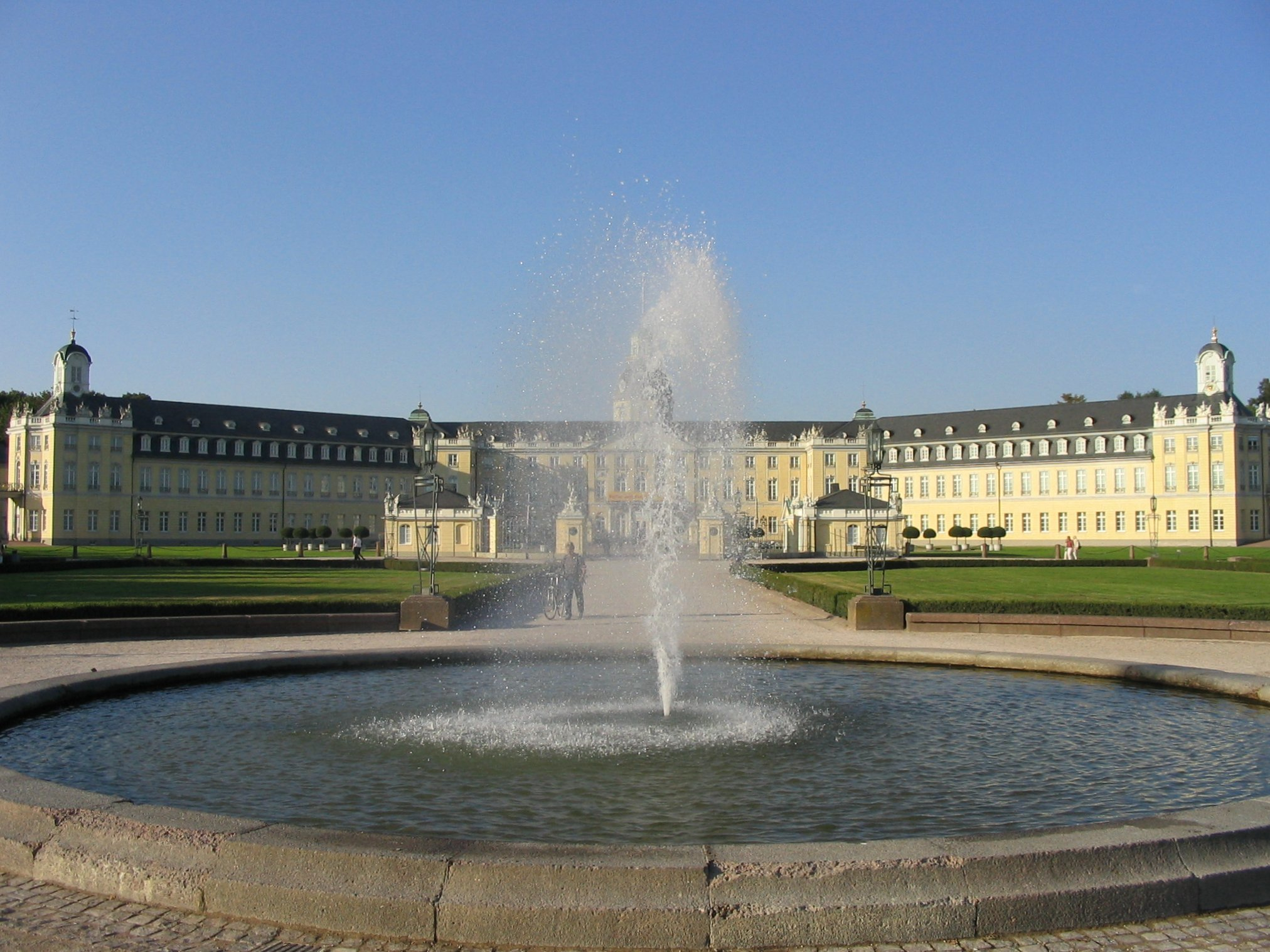 Der Springbrunnen vor dem Karlsruher Schloss